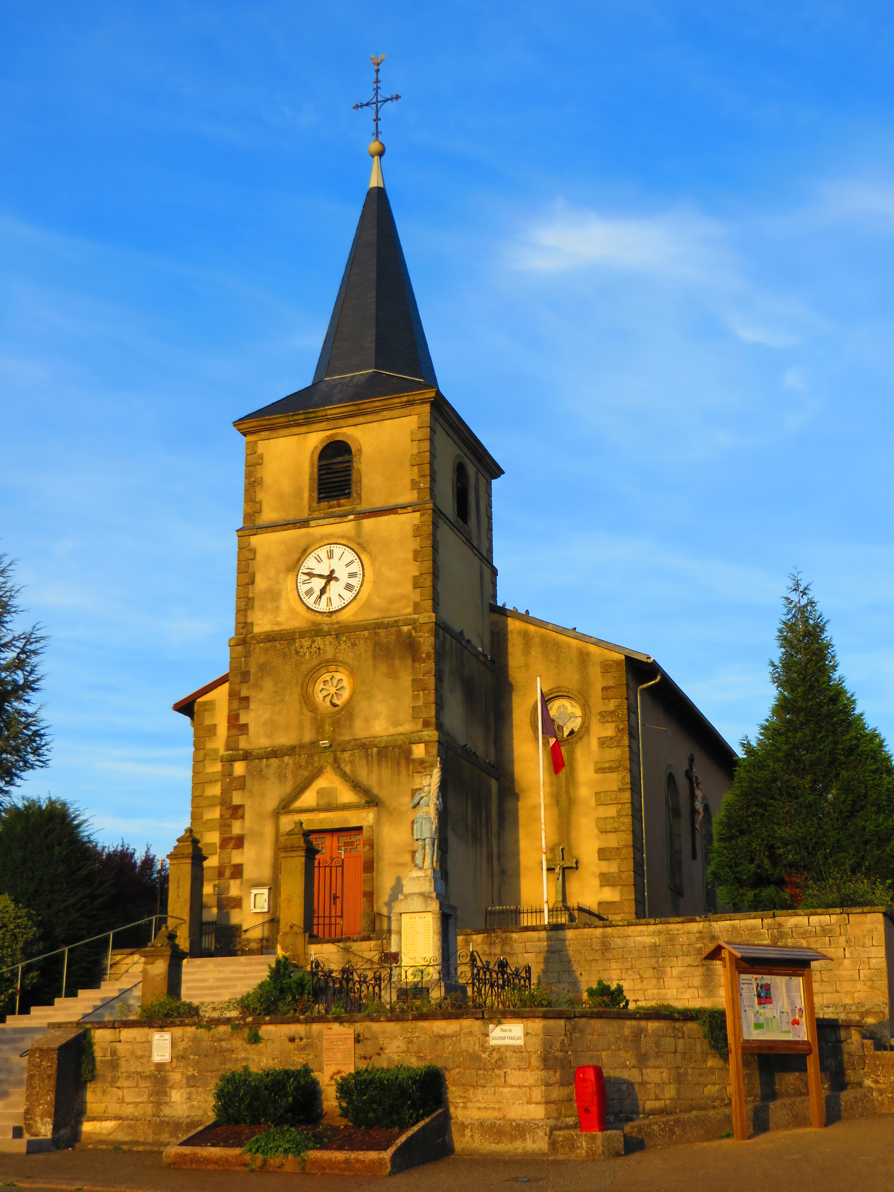 Bermering l'église Saint-Martin